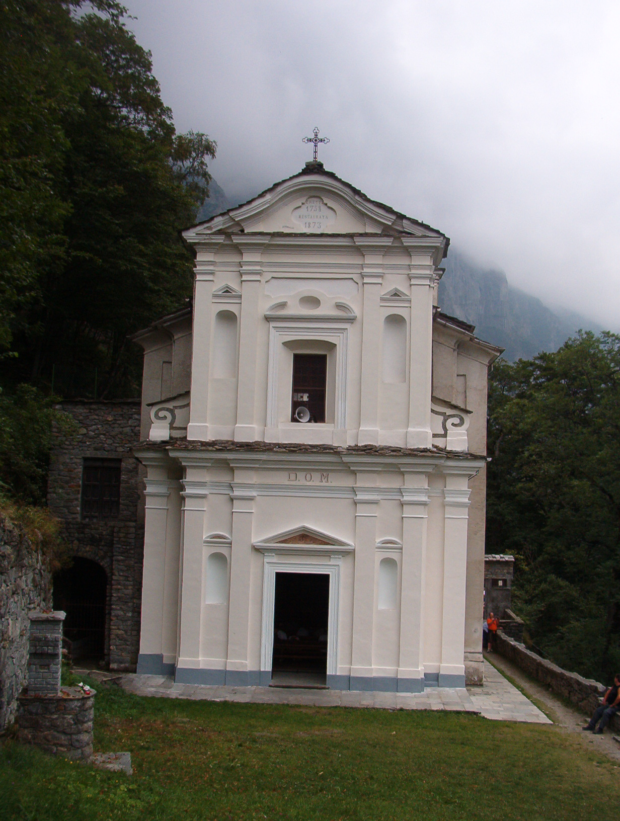 Santuario Madonna di Loreto a Forno Alpi Graie - Groscavallo - Piedmont - Italy